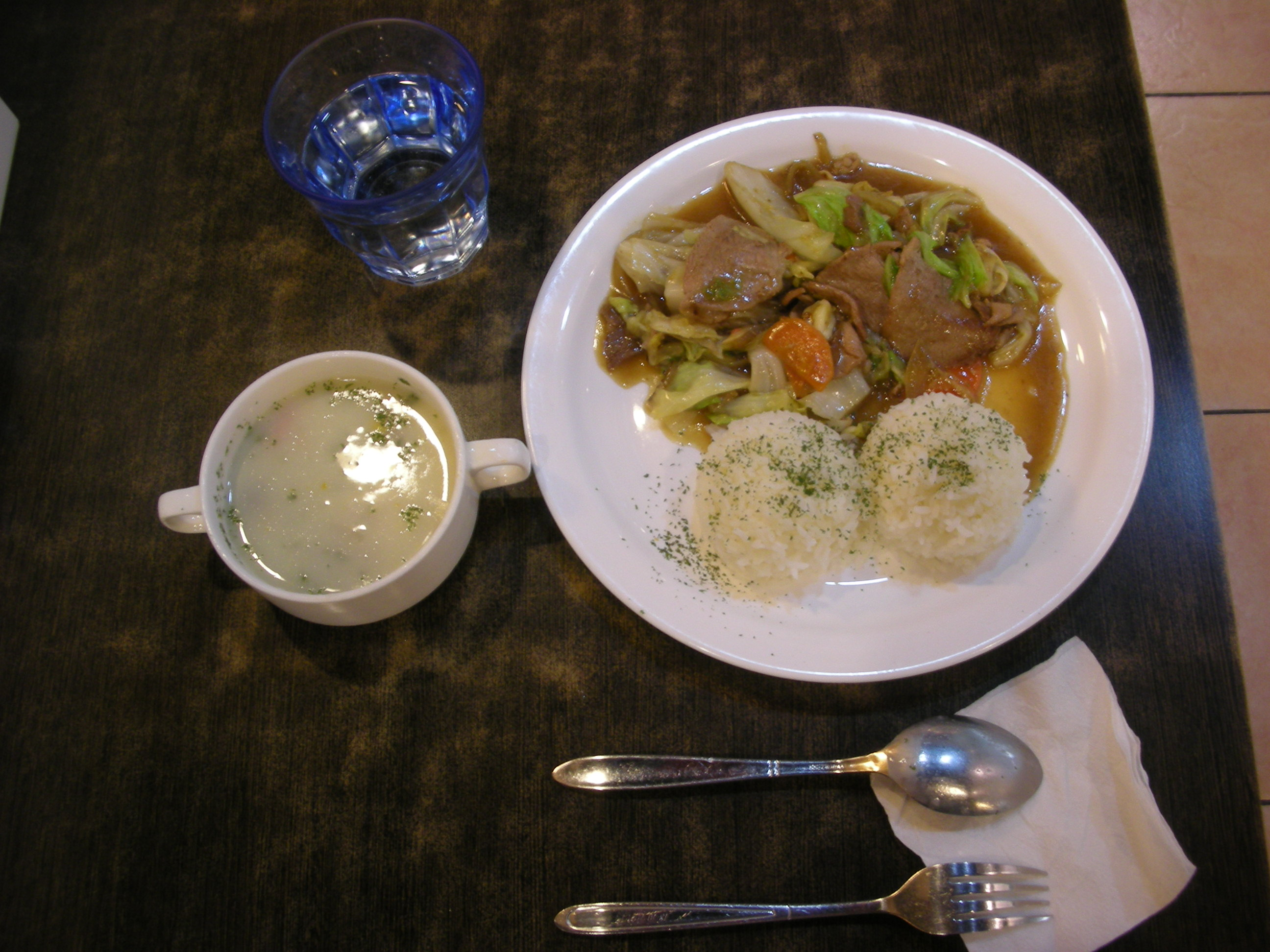 豬肉套餐